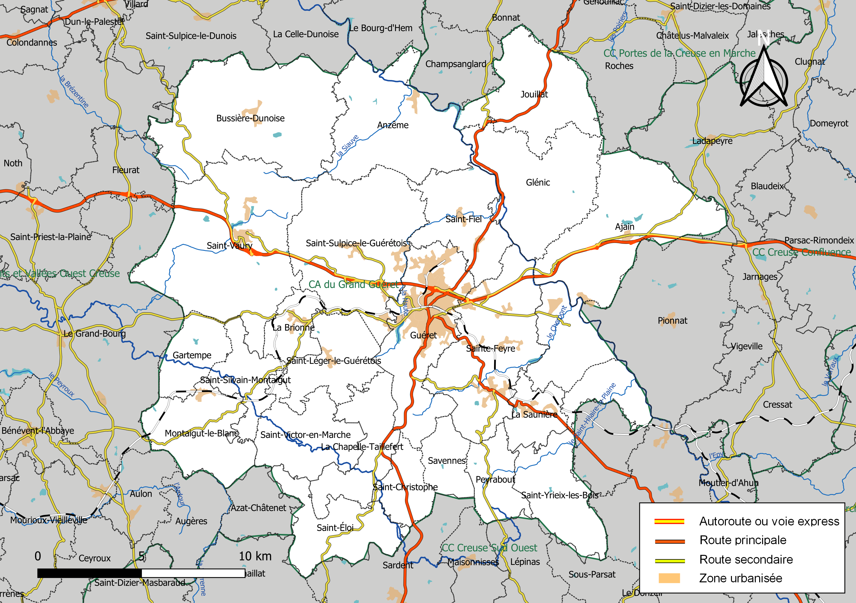 Carte géographique de la Communauté d'agglomération du Grand Guéret, département de la Creuse, France. Composition au 1er janvier 2019.